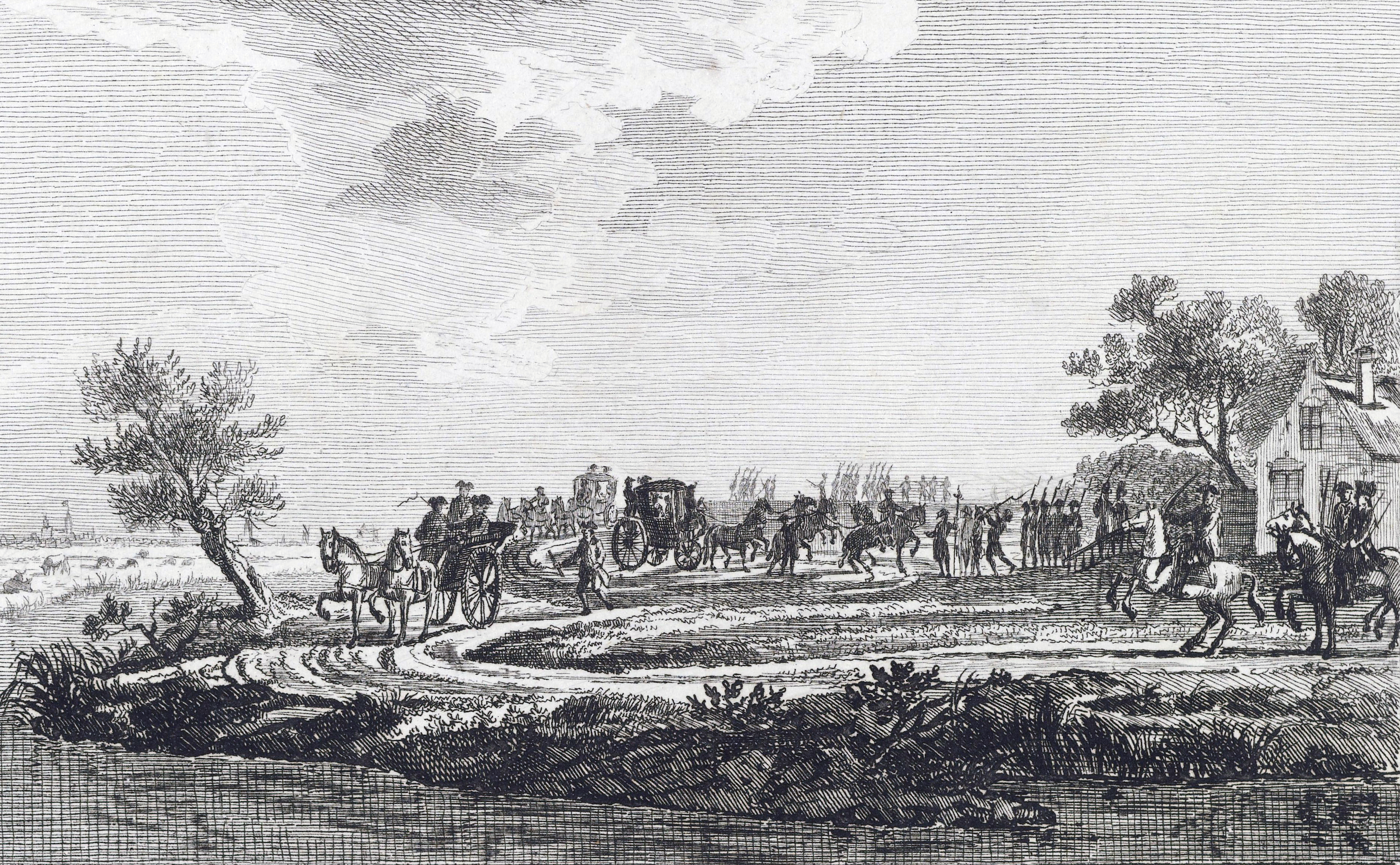 Aanhouding van prinses Wilhelmina van Pruisen in de Vlist 28 juni 1787 door Mathias de Sallieth naar Karle la Fargue